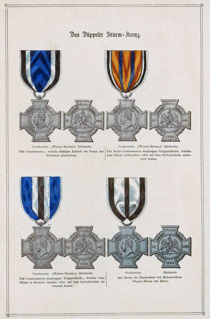 Ein preussisches Ehrenzeichen und Auszeichnungen